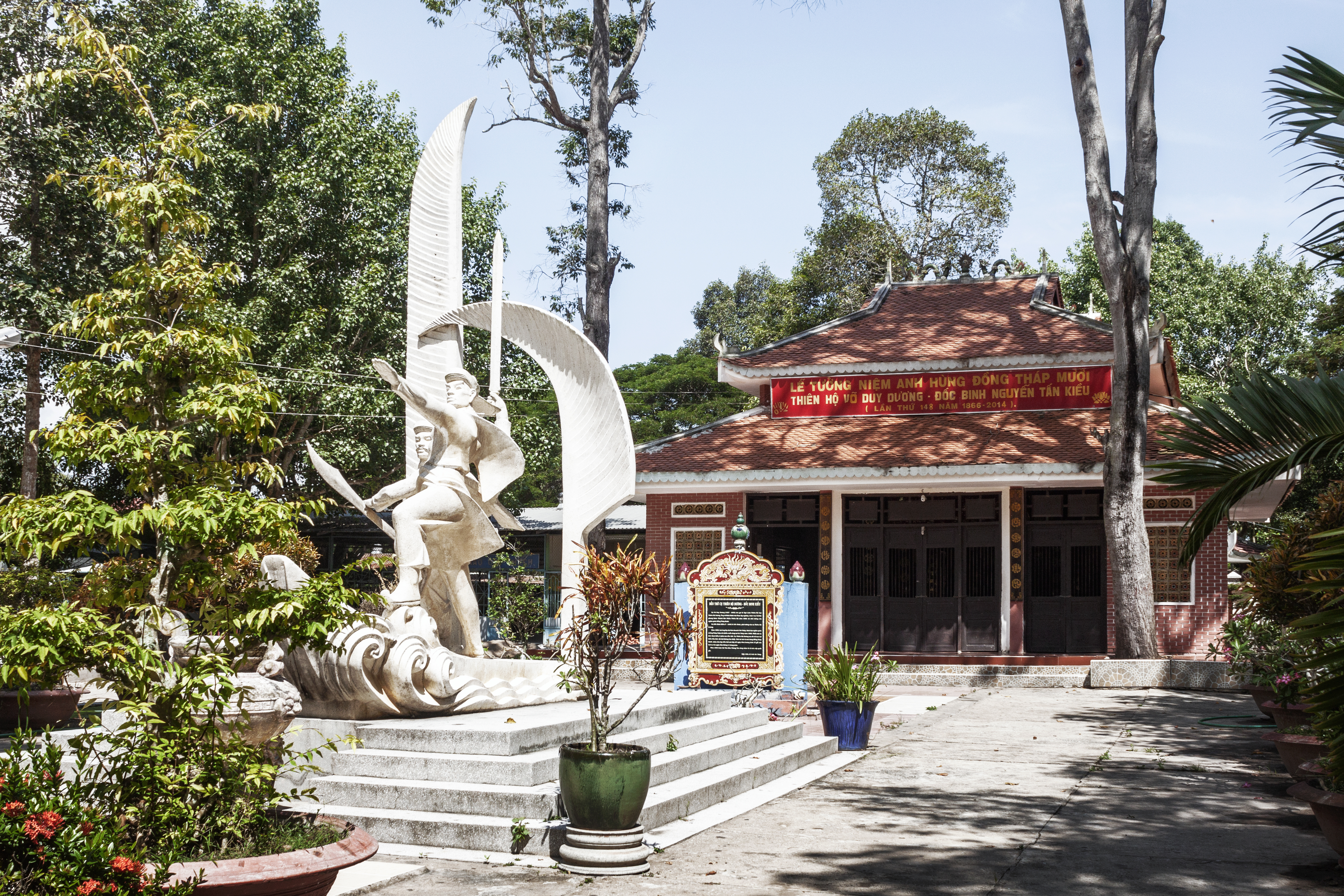 Đền thờ Võ Duy Dương (1827-1866) và Đốc Binh Kiều (?- 1886); nay thuộc Gò Tháp, xã Mỹ Trà, huyện Tháp Mười, tỉnh Đồng Tháp, Việt Nam. Đây là nơi từng nổ ra cuộc khởi nghĩa chống thực dân Pháp (1862-1866) do hai ông lãnh đạo…